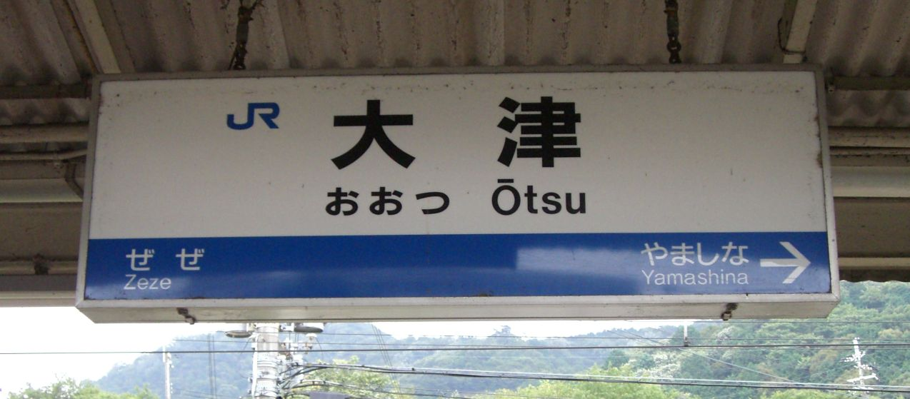 JR West Otsu Station